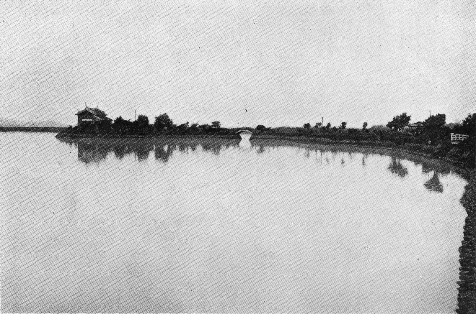 中文（台灣）: 位於桃園停車場(車站)往東南約1.4公里處